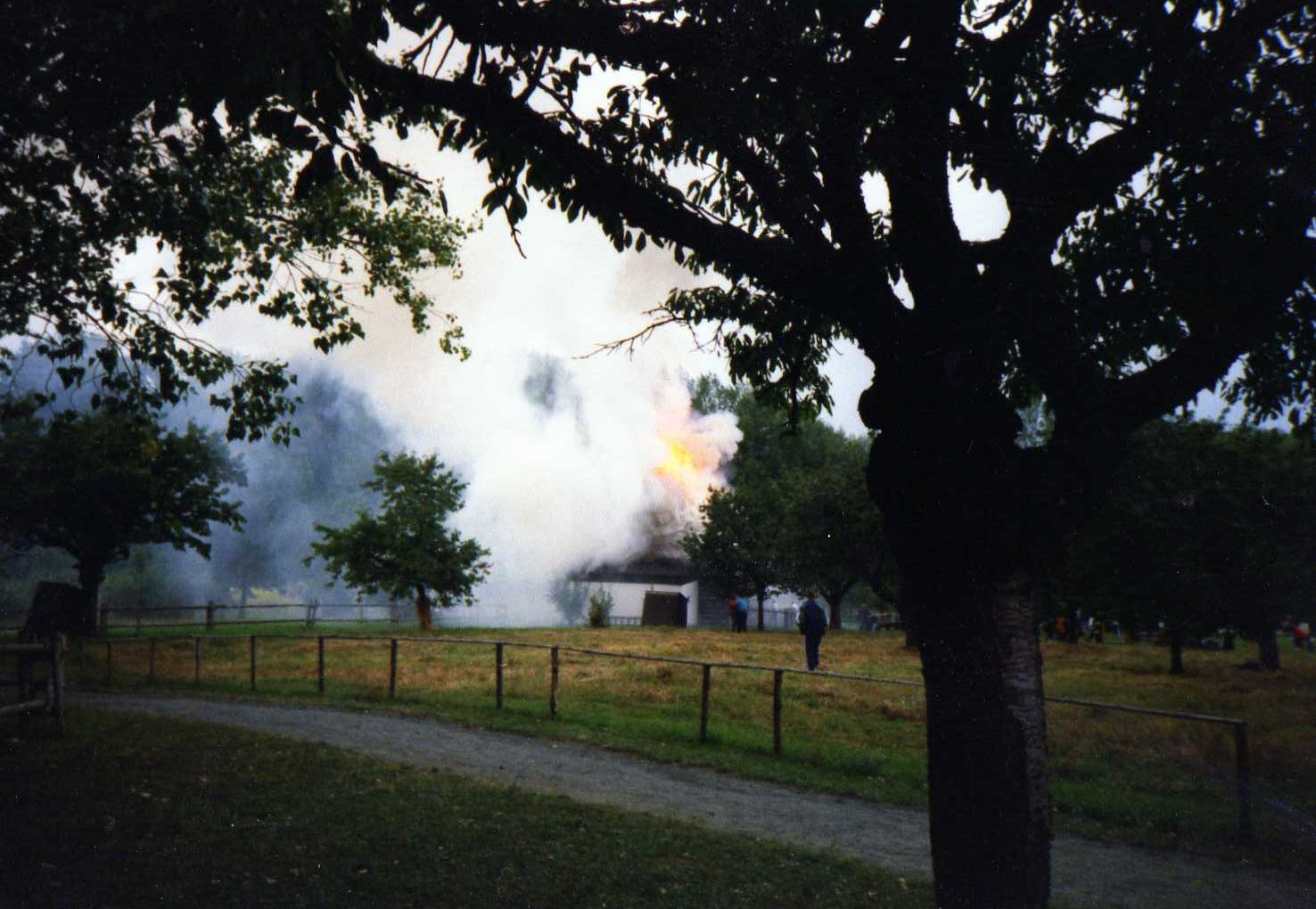 Požár Bradlecké rychty, srpen 1998, Muzeum lidových staveb v Kouřimi